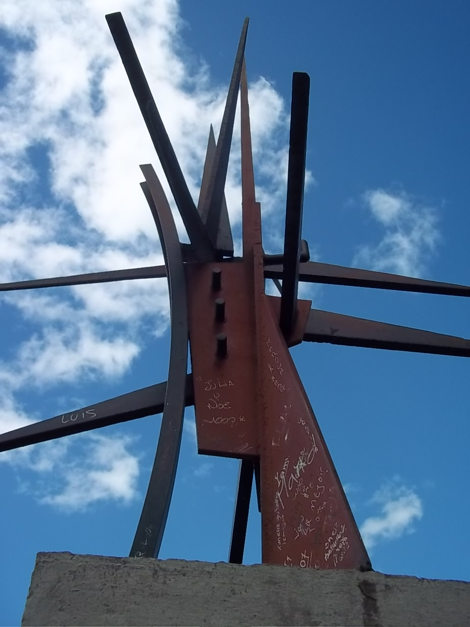 Escultura a Eduardo Levratto. Ubicada en el departamento de Río Negro